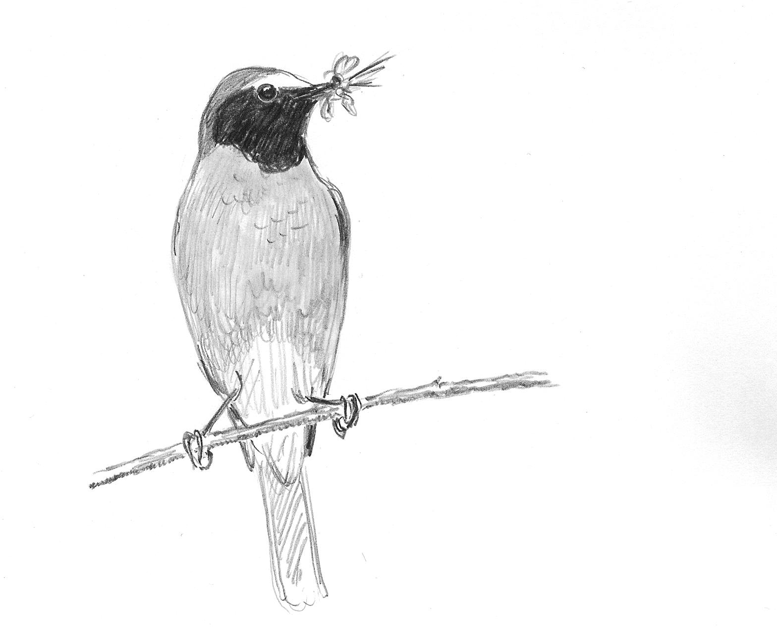 Phoenicurus phoenicurus